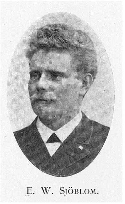 Porträtt